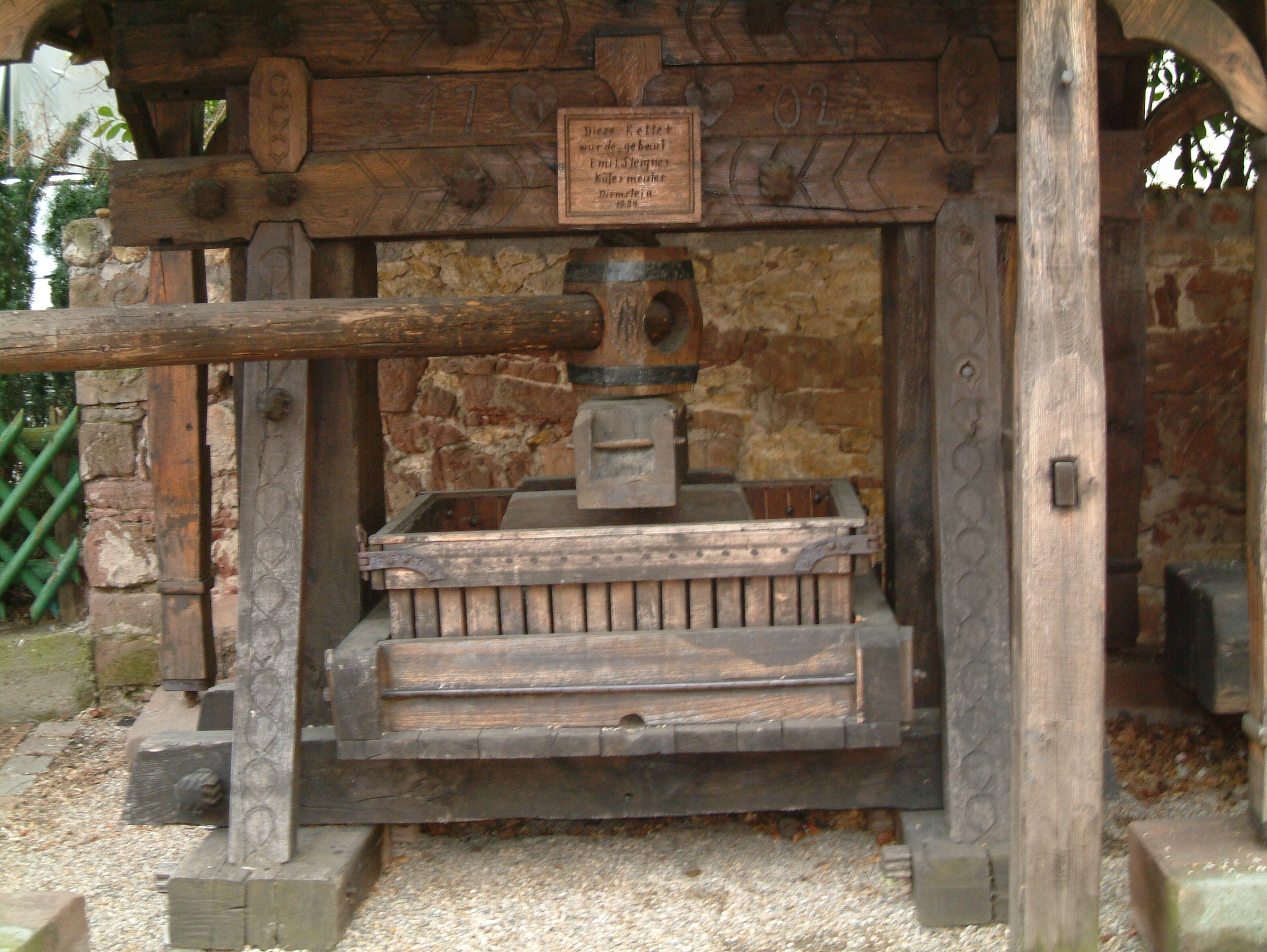 Weinkelter zu Dirmstein, selbst fotografiert am 27.04.2006 und freigegeben durch Benutzer:Mundartpoet